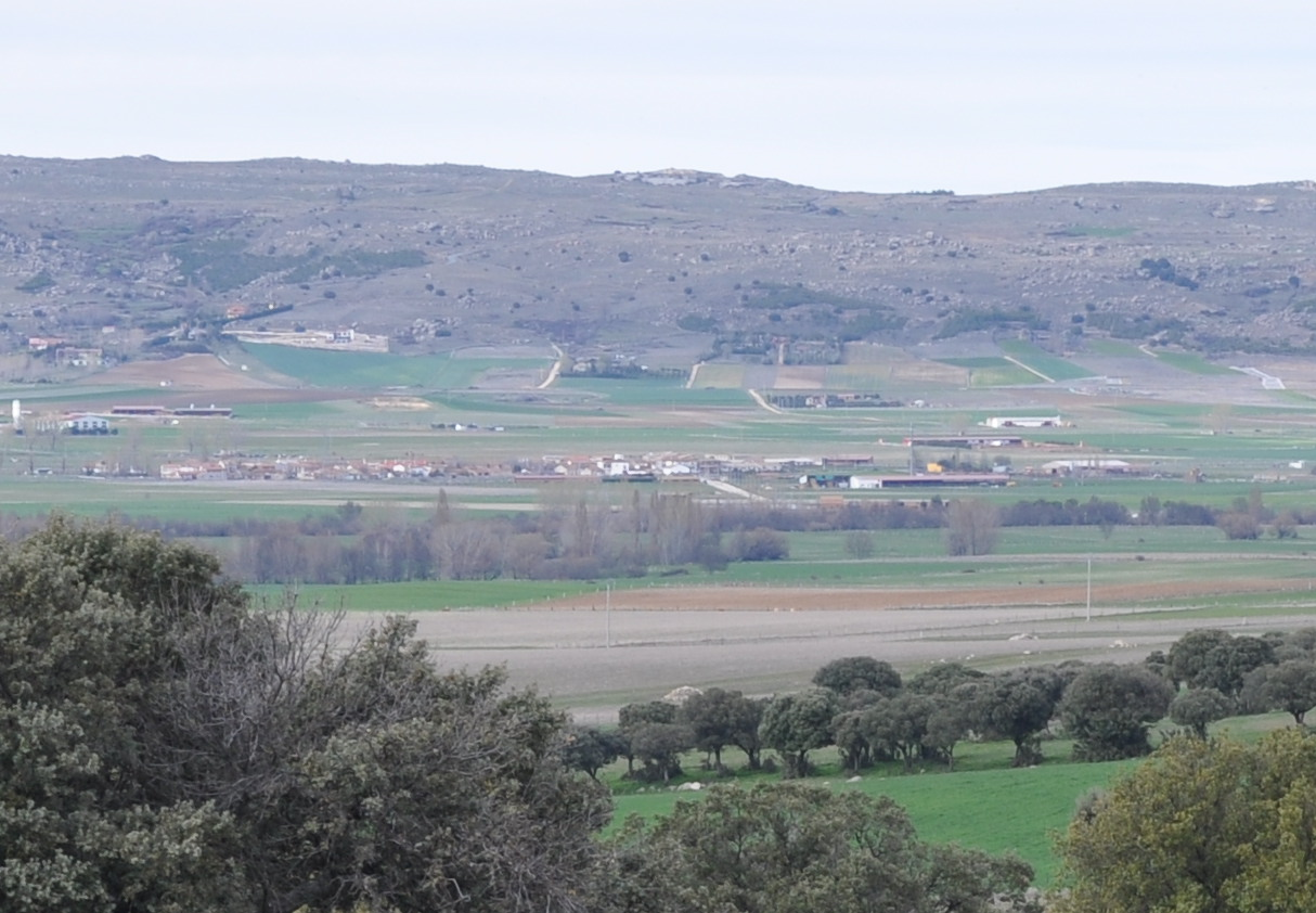 Panorámica de Salobral, Muñopepe y La Serrada en el valle de Amblés desde la sierra de Yemas, Provincia de Ávila, España.